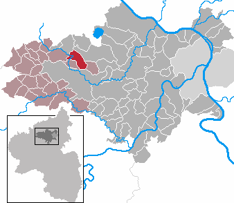 Ettringen in Rhineland-Palatinate - district Mayen-Koblenz